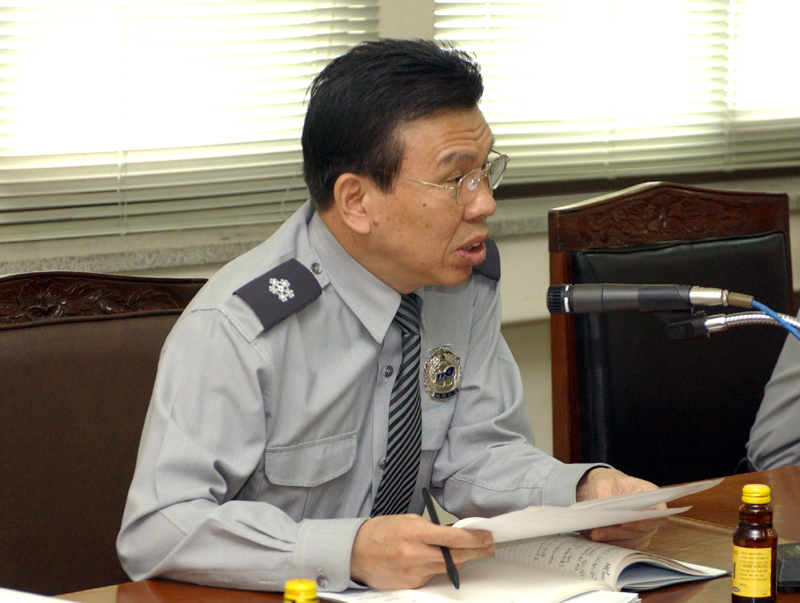 서울특별시 소방재난본부 소장 사진. photos of Seoul Metropolitan Fire & Disaster Headquarters.